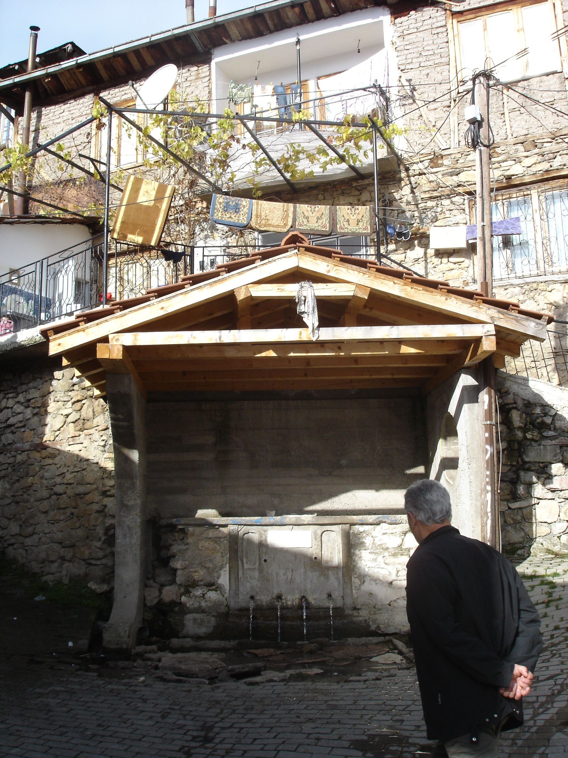 Селската чешма во Горно Косоврасти (Дебарско)